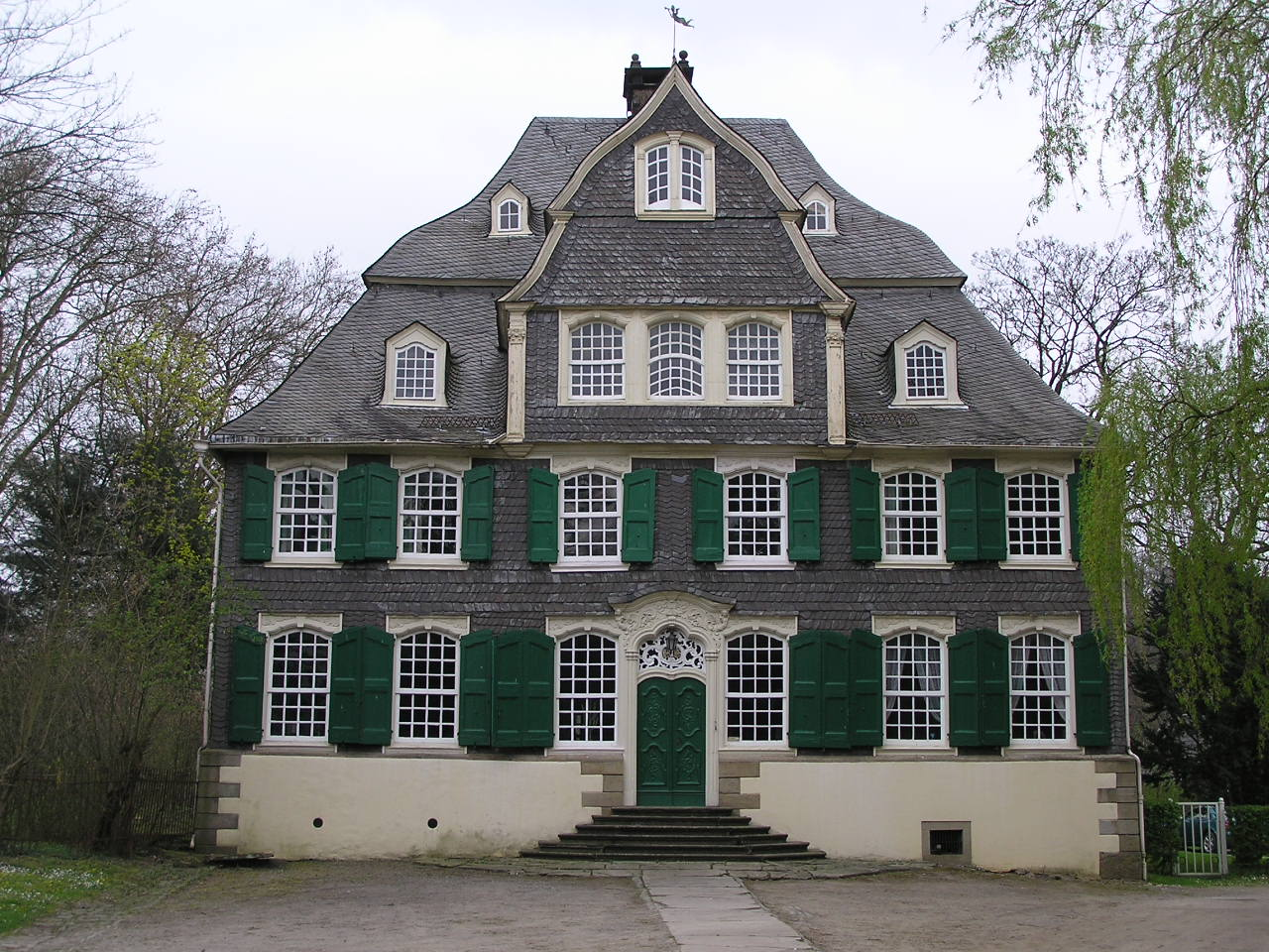 Haus Harkorten - Herrenhaus in Hagen